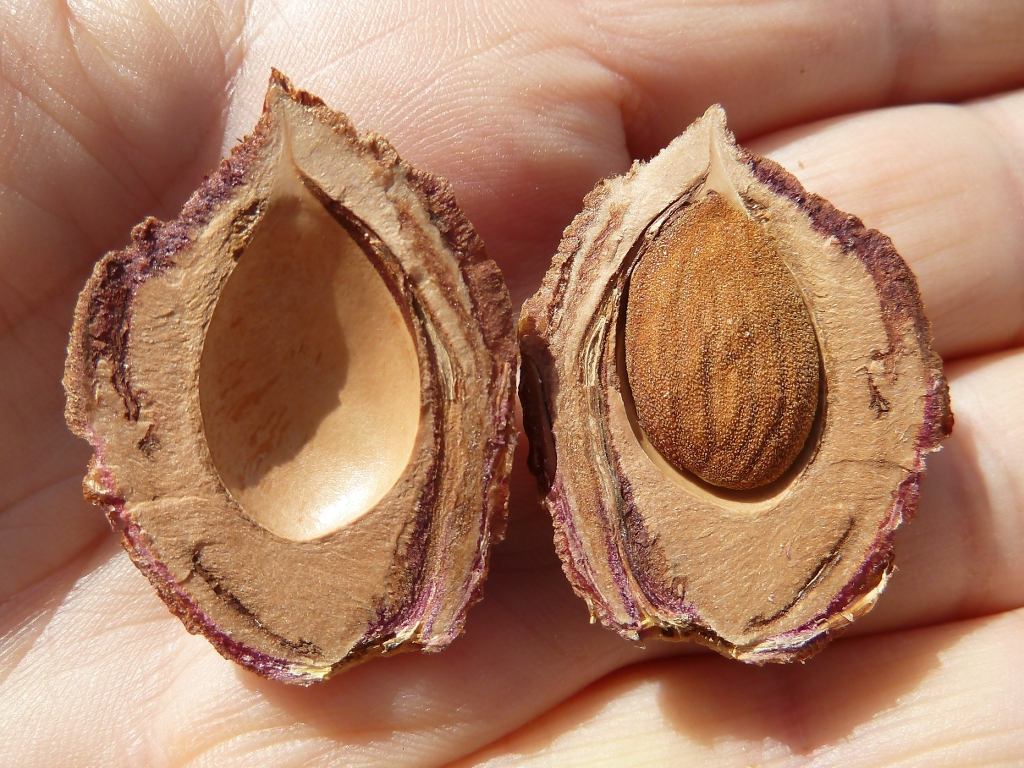 Prunus persica cv. amarillo (Melocotón amarillo): hueso abierto con su semilla almendroide in situ - Comercio, Madrid (España).